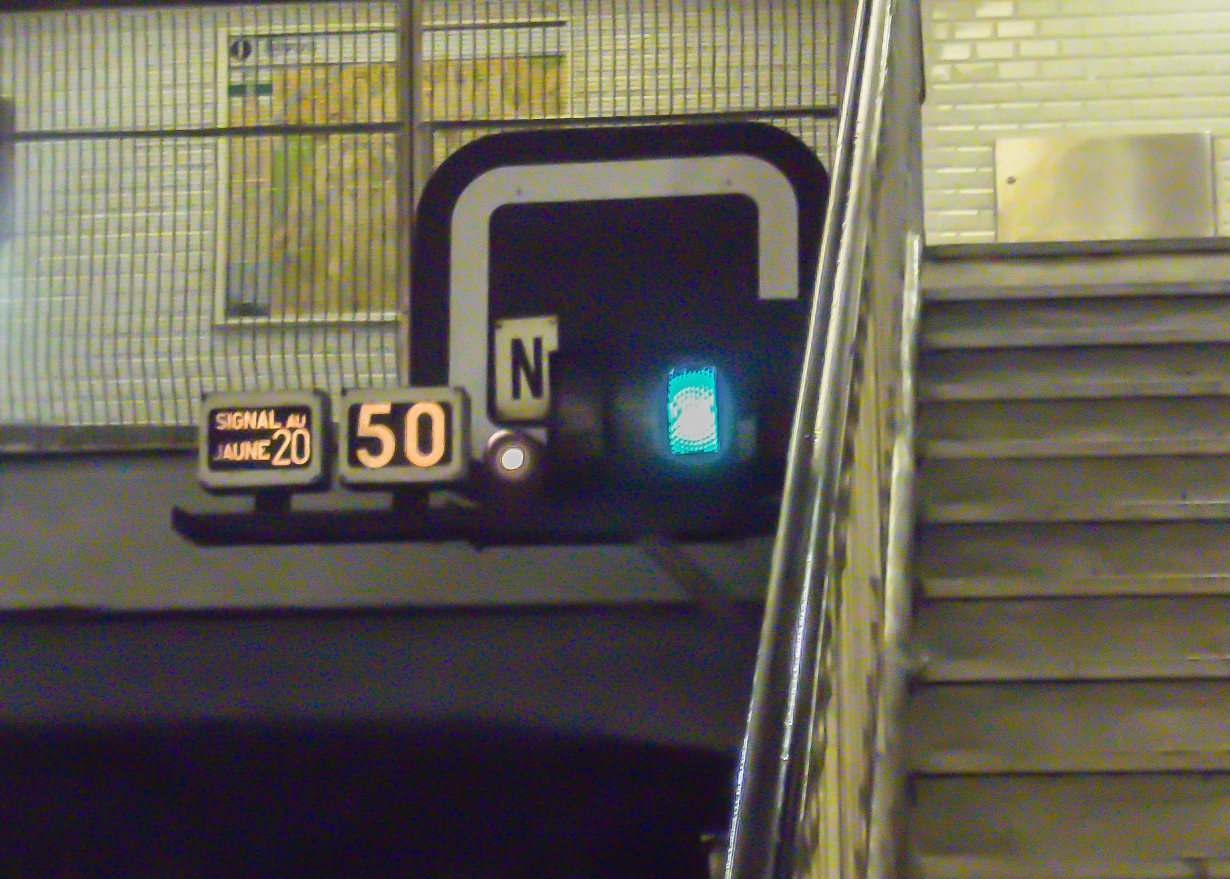 Signalisation en sortie du quai en direction de Créteil à la station Lourmel sur la ligne 8 du métro de Paris.